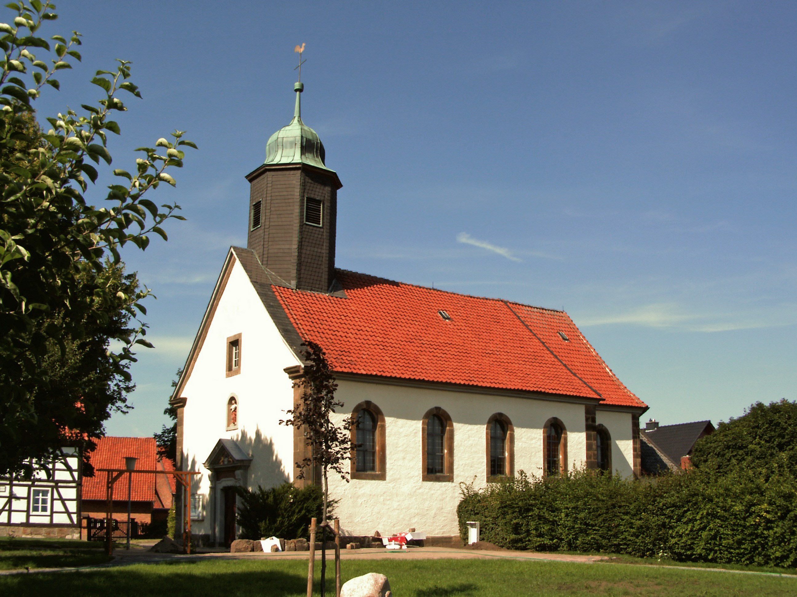 Katholische Kirche St. Matthias in Hüddessum, von Südwesten aus gesehen